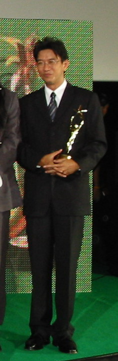 Sunya Kunakorn at Star Entertainment Awards 2007